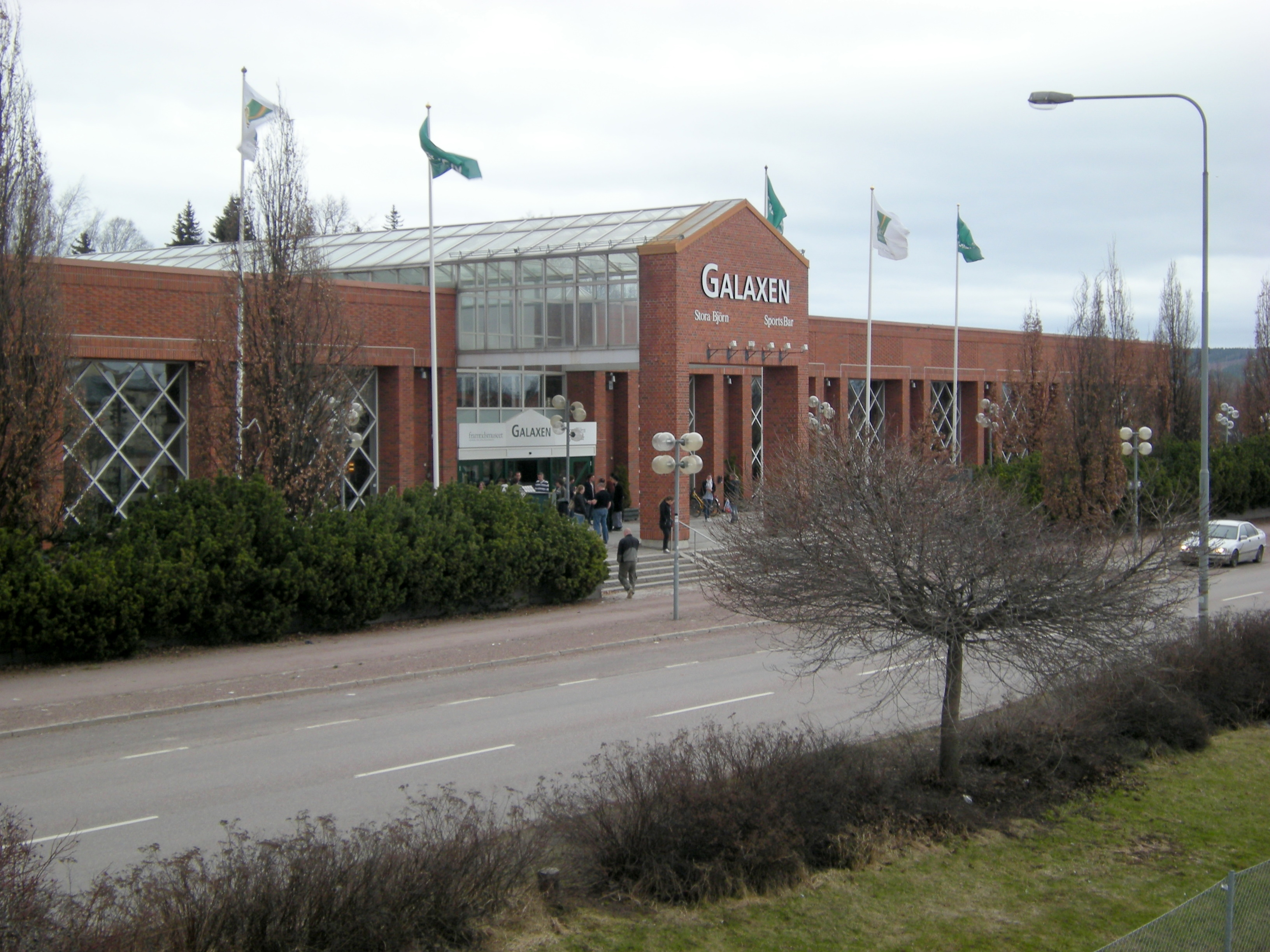 Borlänge Folkets hus